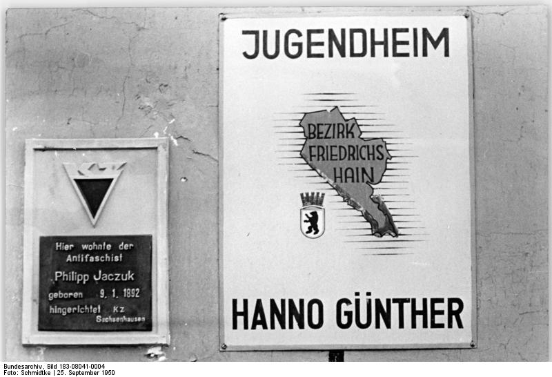 Berlin, Jugendheim, Plakette Illus Schmidtke 25.9.50 Berlin 1950. Am Schlesischen Bahnhof befindet sich das Jugendheim Hanno Günther.